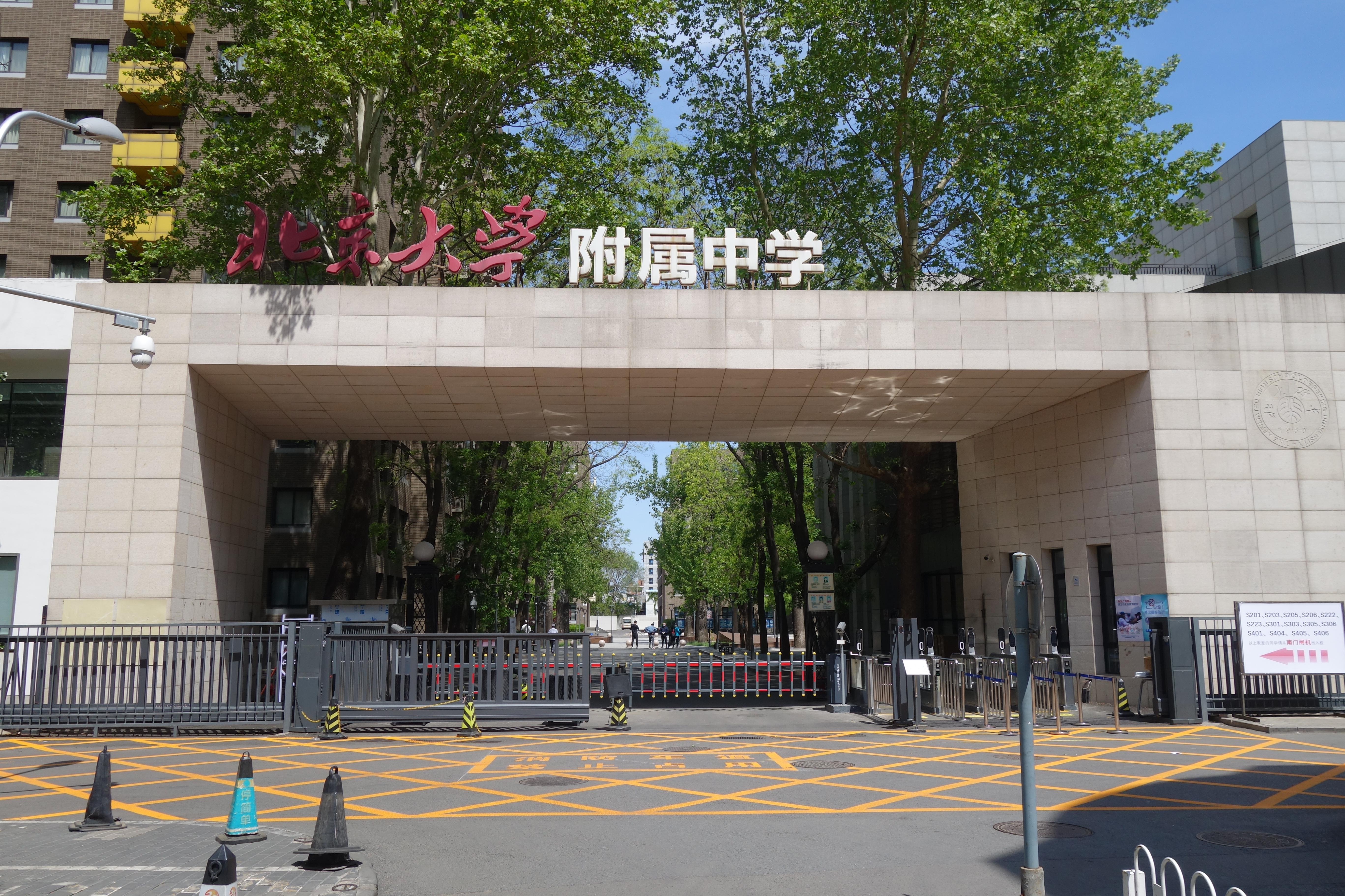 中文（中国大陆）: 2020年4月25日，北京大学附属中学南门景观，大门上以艺术字书写“北京大学附属中学”，门右侧有校徽，南门前有严格的管控与安全措施。